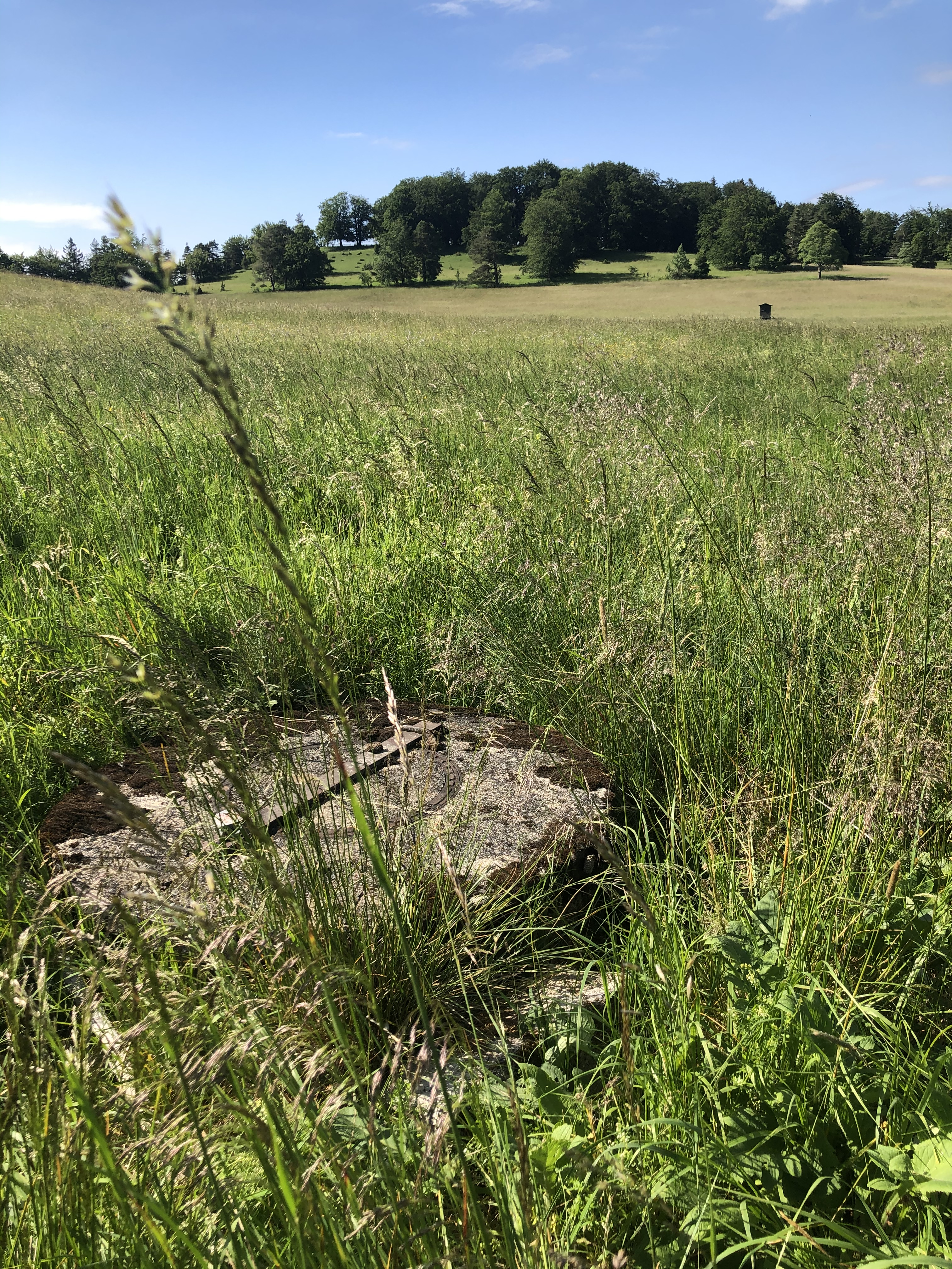 Der Blasenberg von der Albhochfläche aus gesehen, im Vordergrund die gefasste Quelle der Schmeie im Naturschutzgebiet Geifitze.